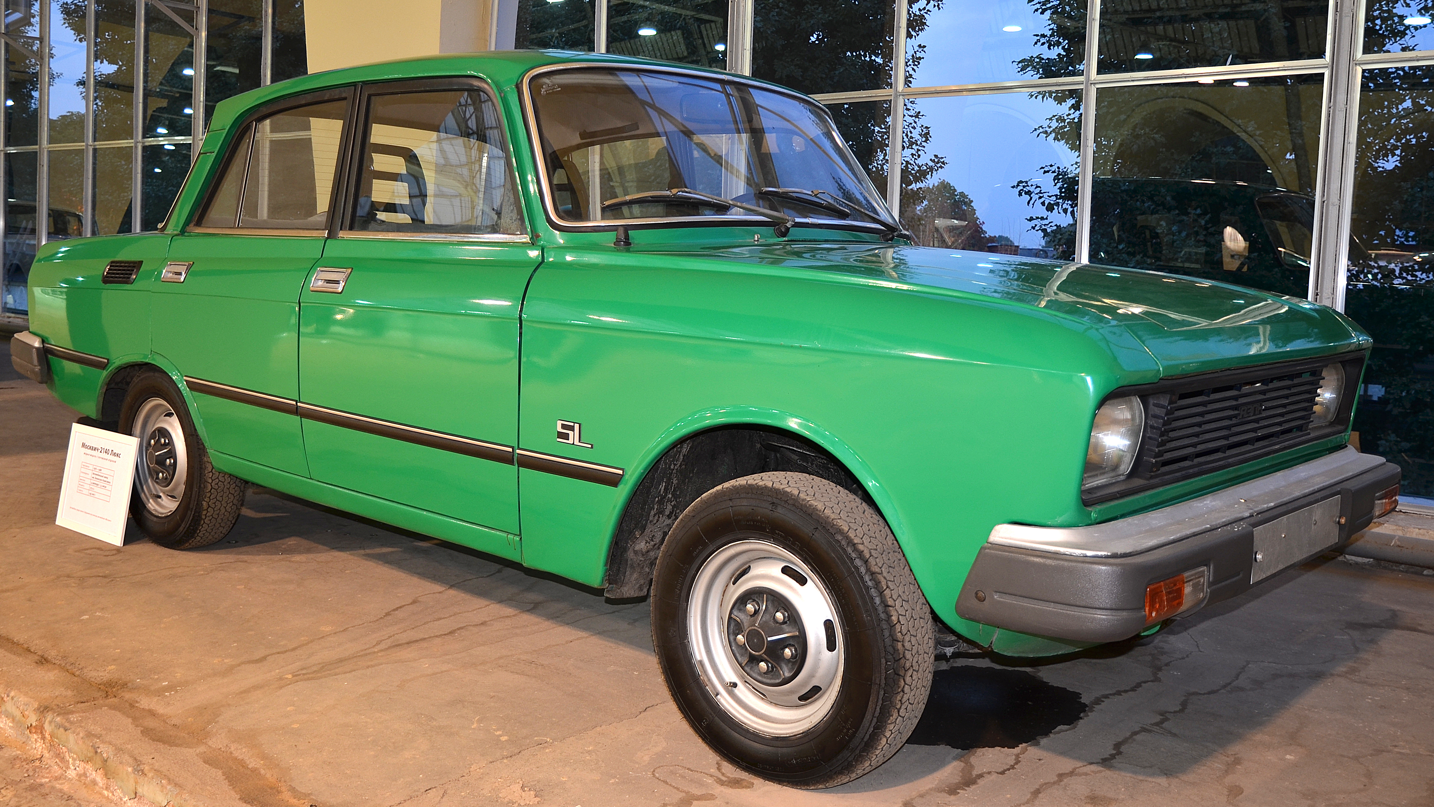 Можно увидеть здесь : You can see here